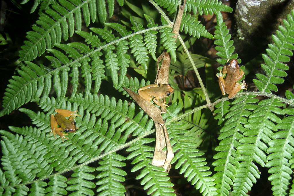 Exerodonta catracha